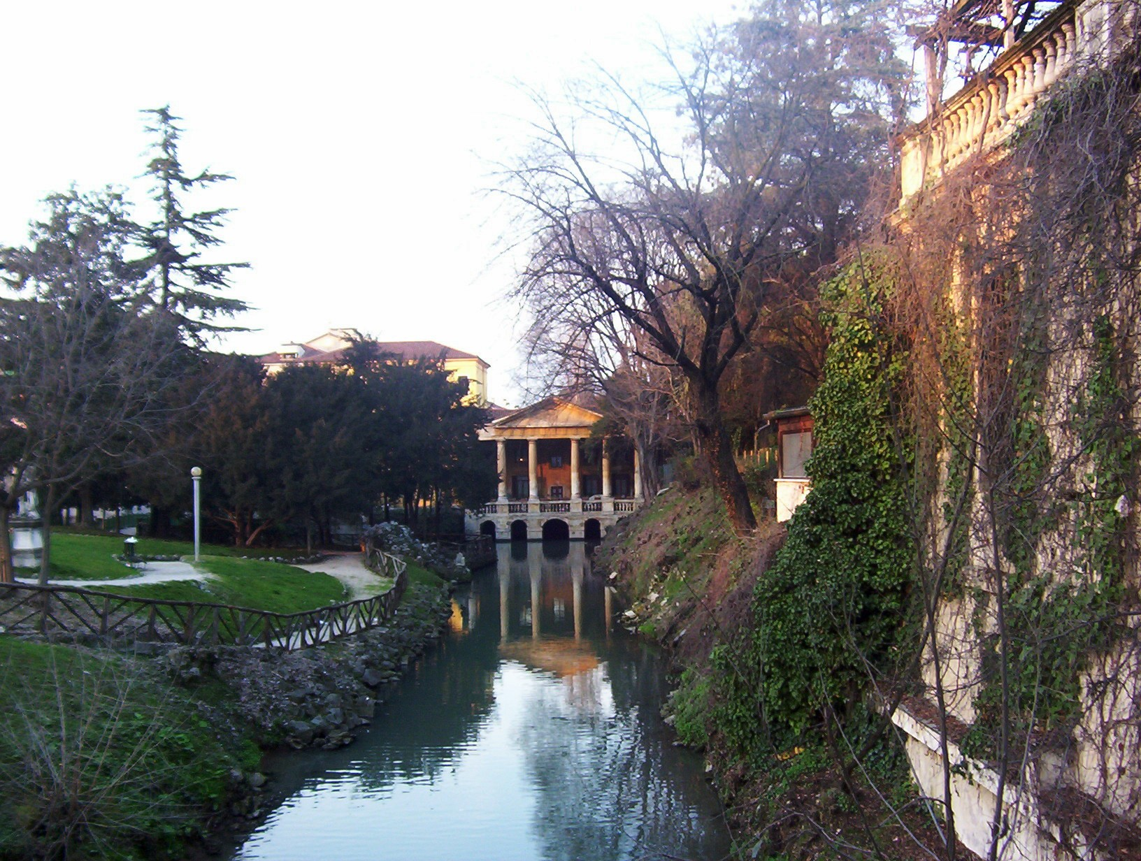 Vicenza, Giardini Salvi: Loggia Valmarana (attribuibile da un allievo di Andrea Palladio).